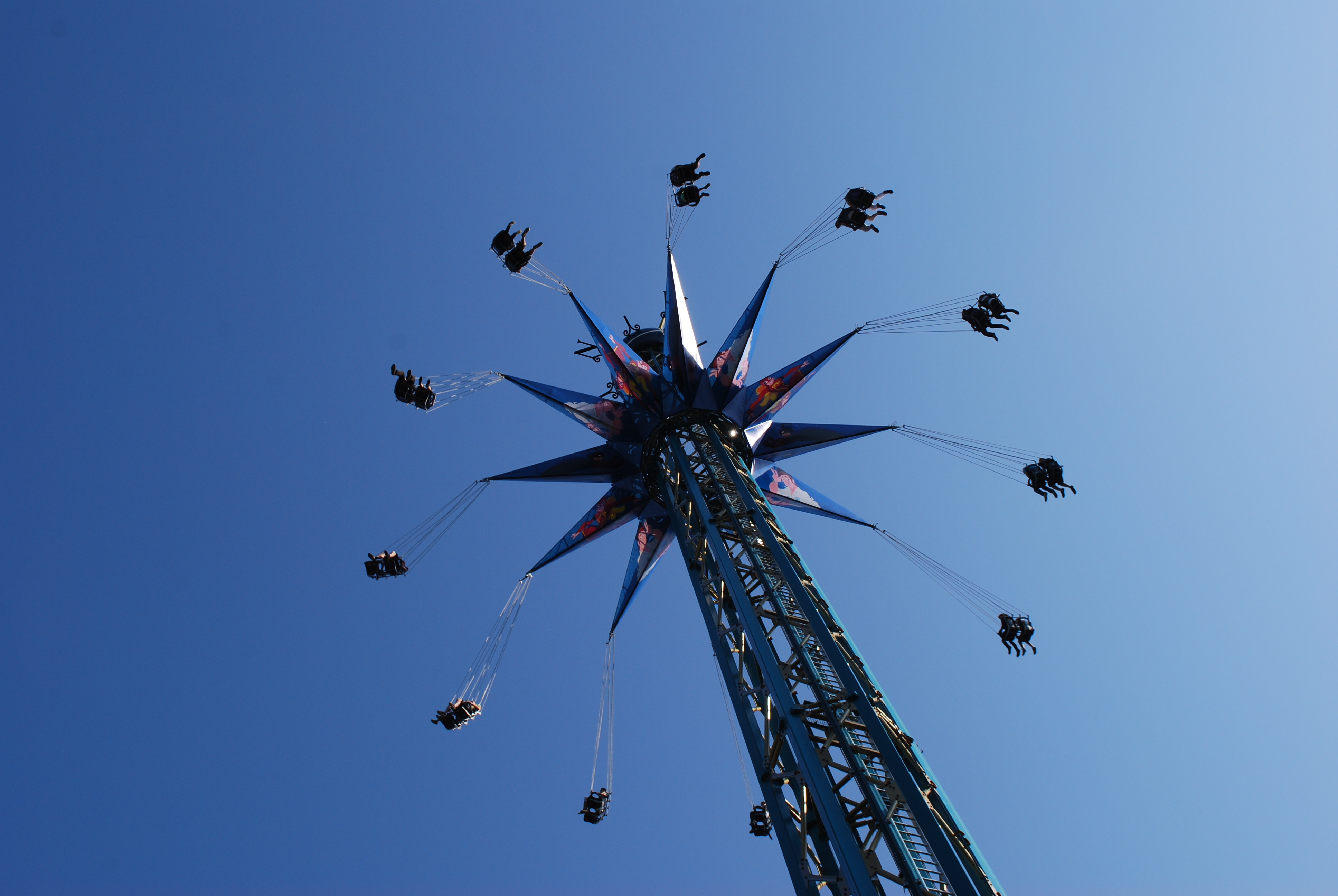 Vue de l'attraction "Mega Mindy Flyer" à Plopsa Coo.